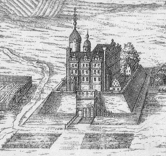 Kupferstich von Schloss Pyrmont. Darstellung des Schlosses vermutlich im Zustand vor dem 30-jährigen Krieg